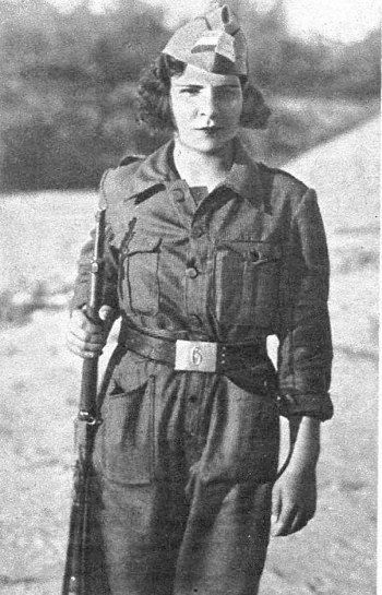 Esperanza Rodríguez co uniforme das Milicias Galegas. 1936